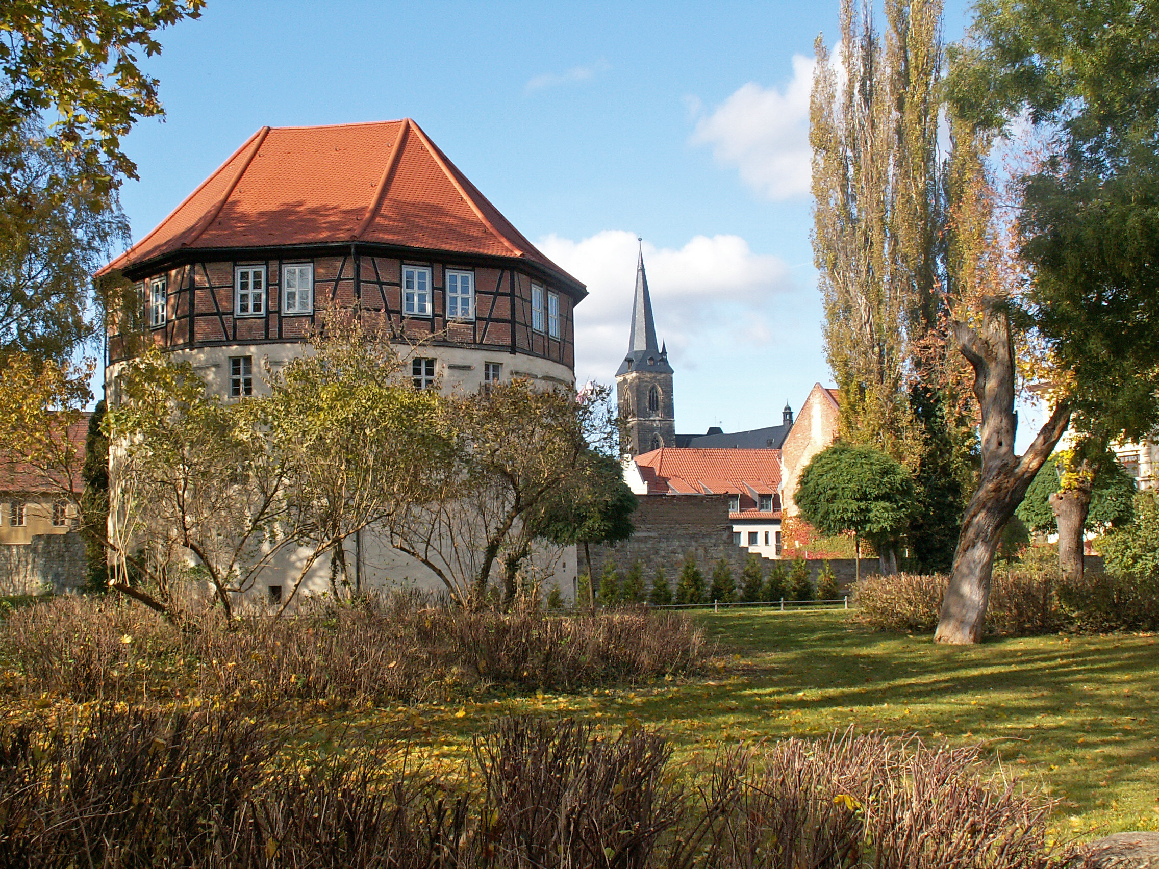 Blick vom Rondell zur Stephanikirche, Aschersleben